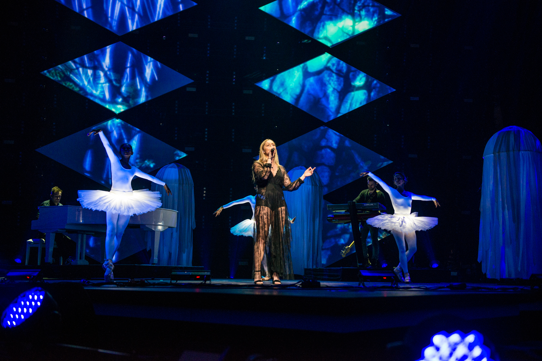 'Eurovision Song Contest 2015 - Unser Song für Österreich': 'Fahrenhaidt'